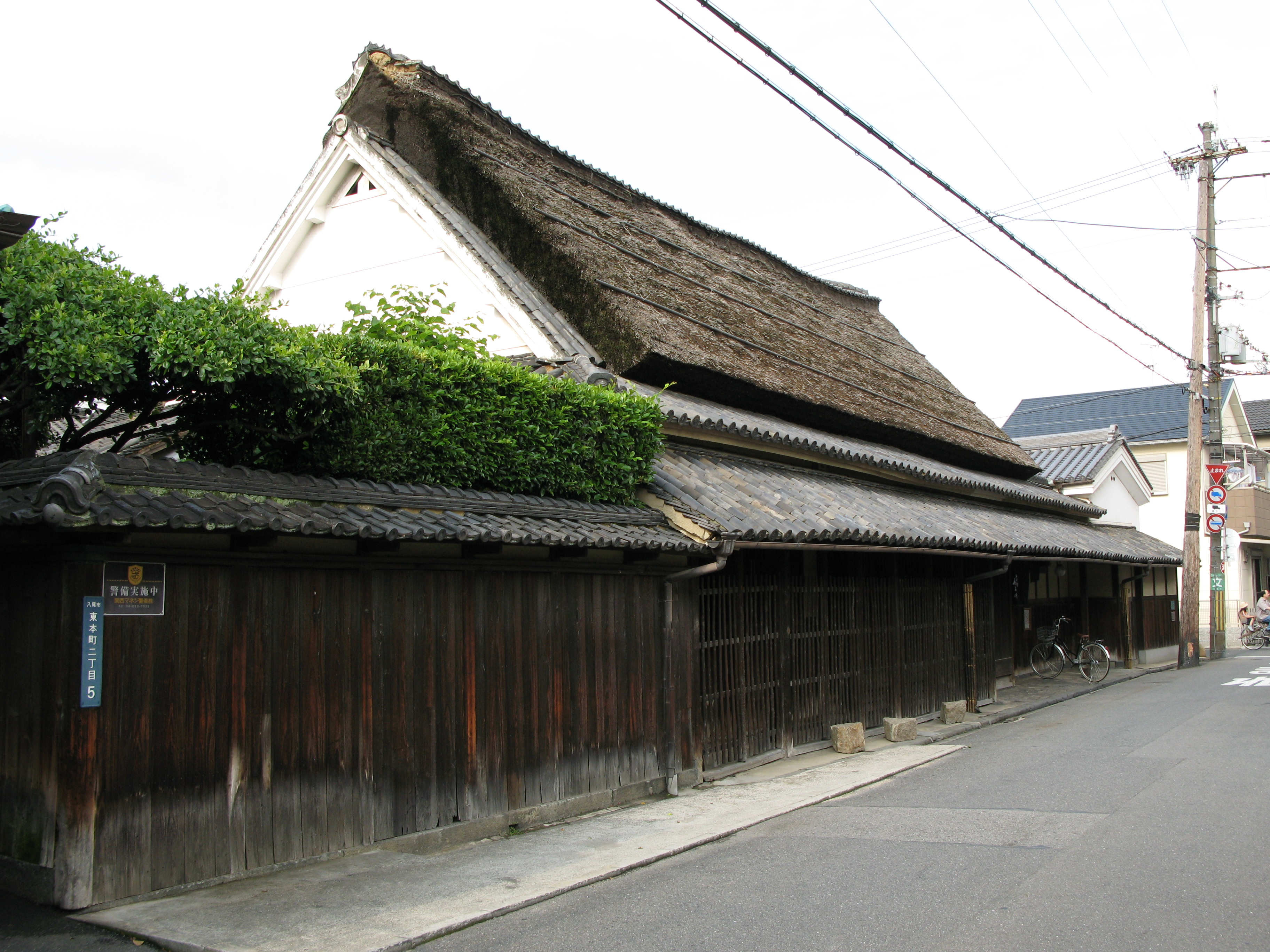 Torindo in Yao, Osaka, Japan